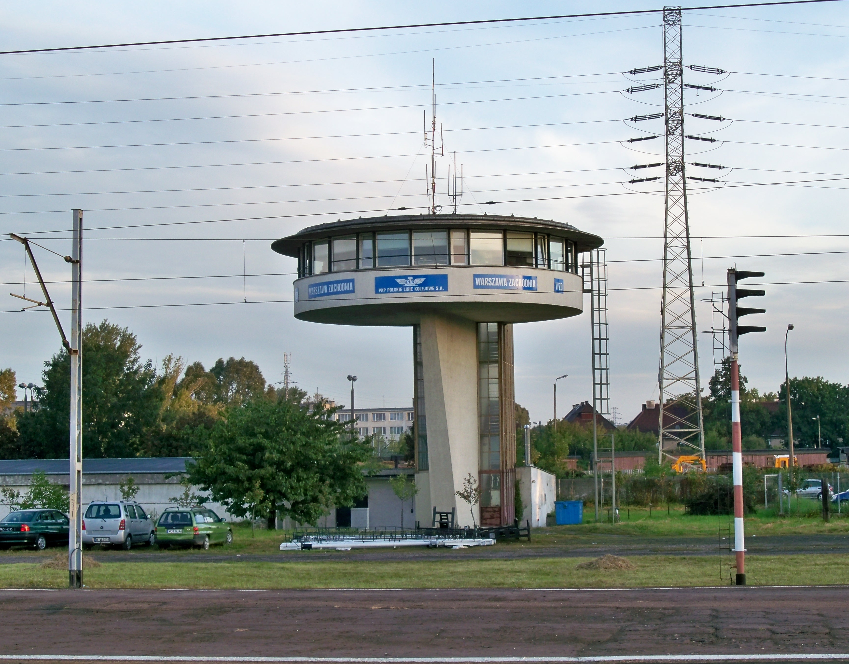 Wieża na dworcu kolejowym Warszawa Zachodnia